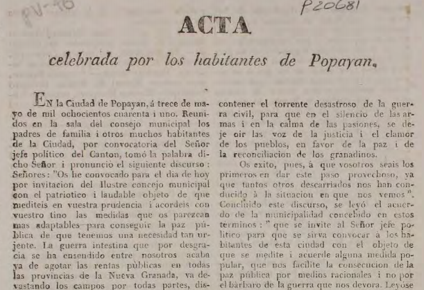 Acta celebrada por los habitantes de Popayán, Colombia, en 1841 para acordar medidas para conseguir la paz pública